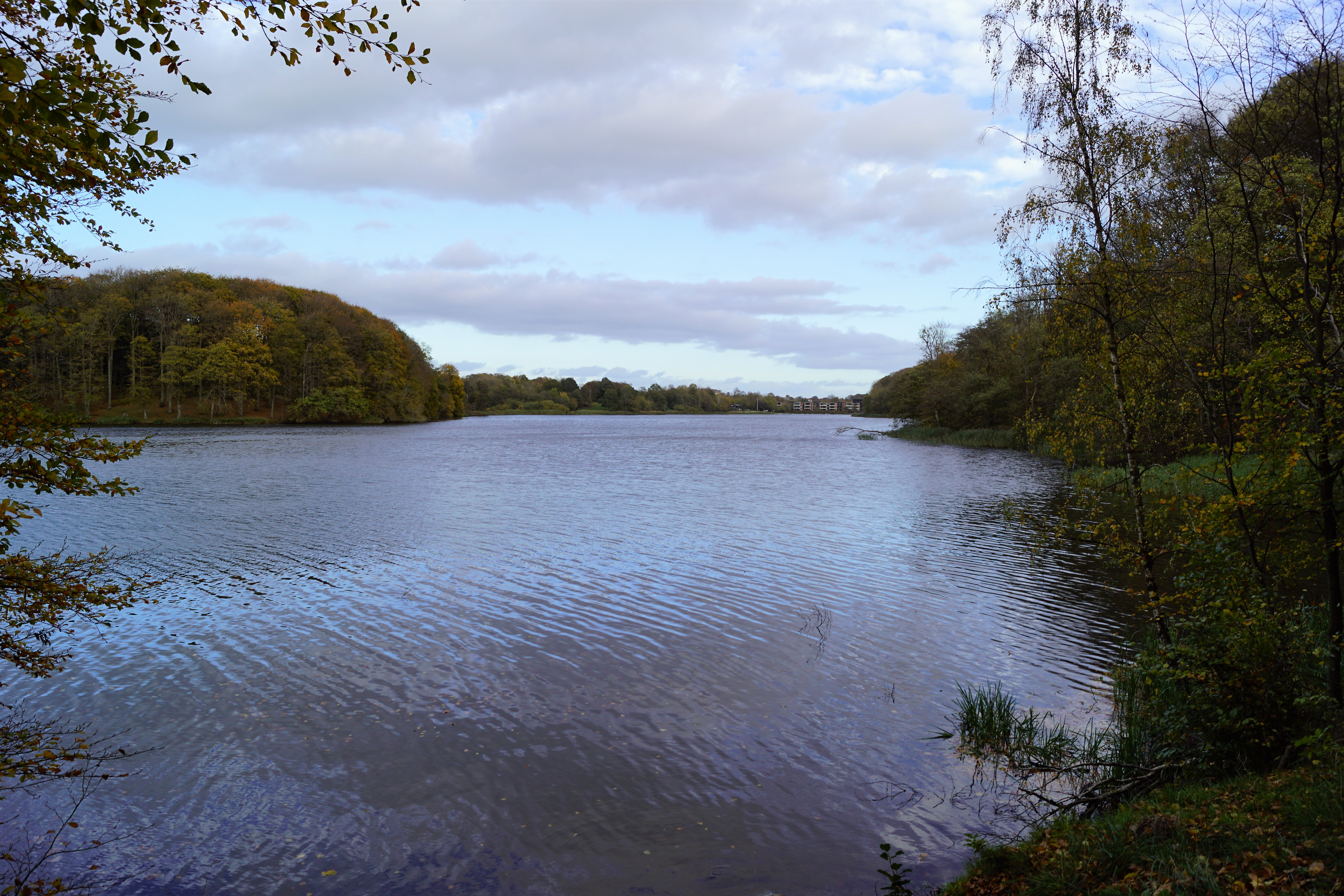 Bygholm Sø set fra sydbredden mod øst